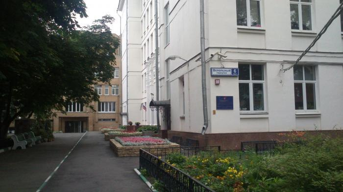 Здание школы